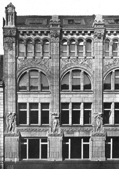 Fassadenreliefs von Otto Stichling am Haus Trarbach, Berlin.